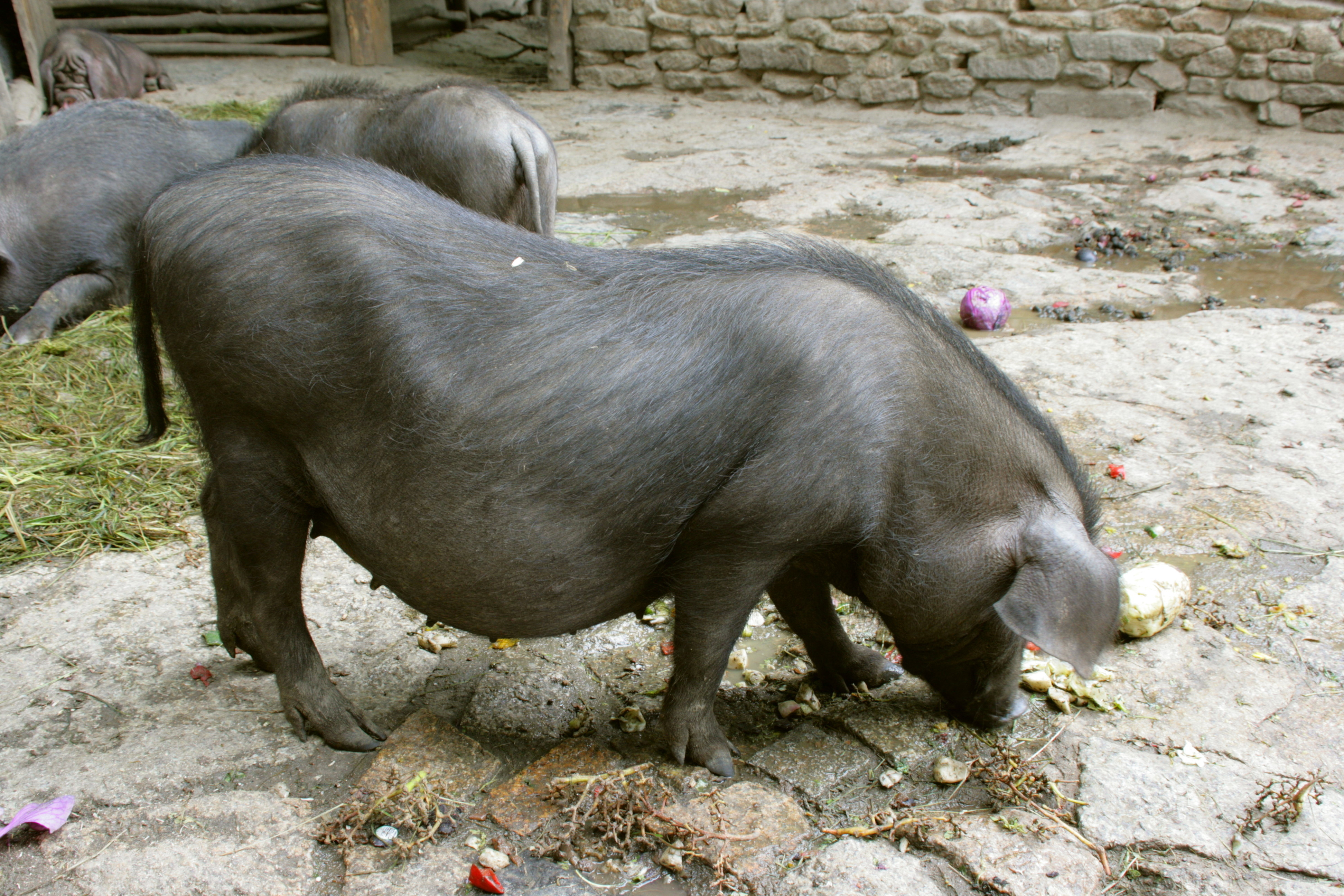 Tierpark in Görlitz